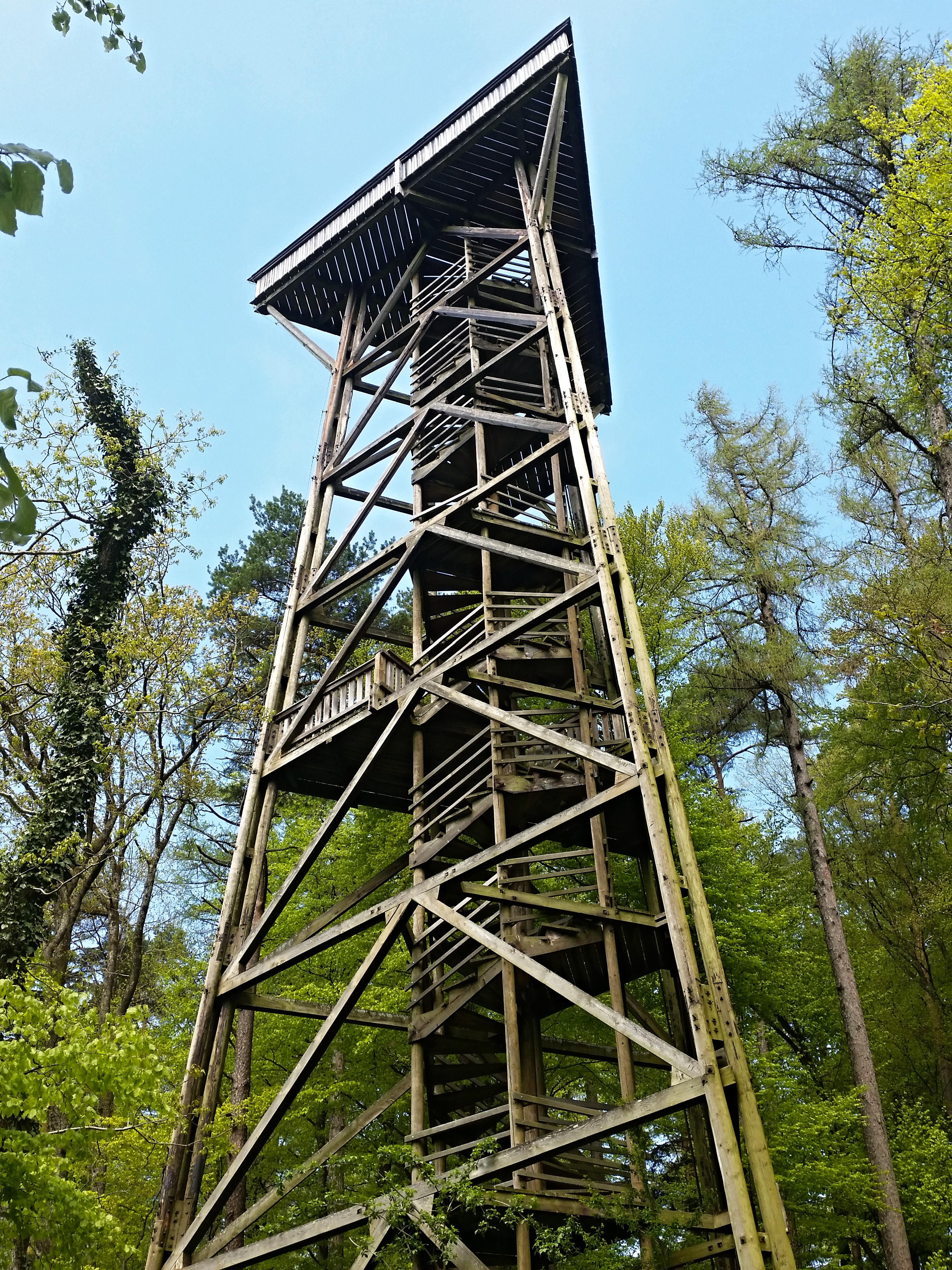 Aussichtsturm Stadlerberg